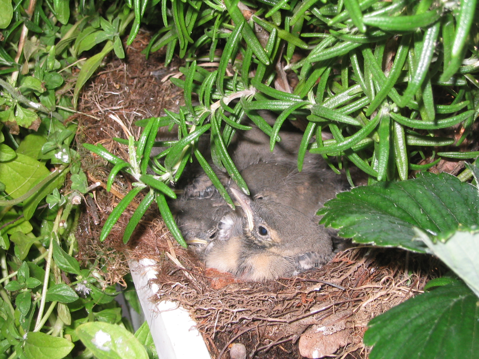 Eier der Bachstelze, nistend in einem Balkonkasten im Rosmarin.